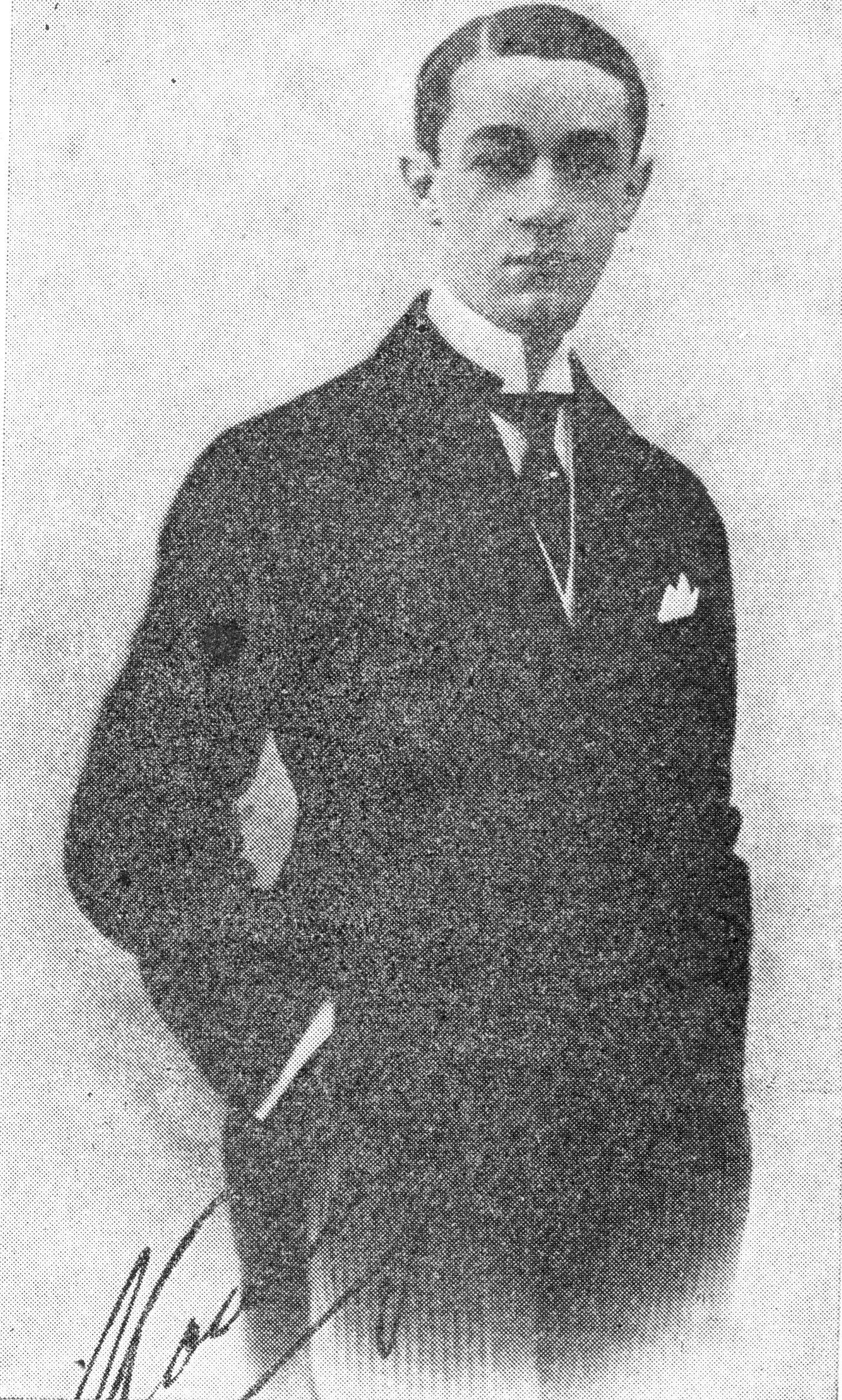 Konrad Tom